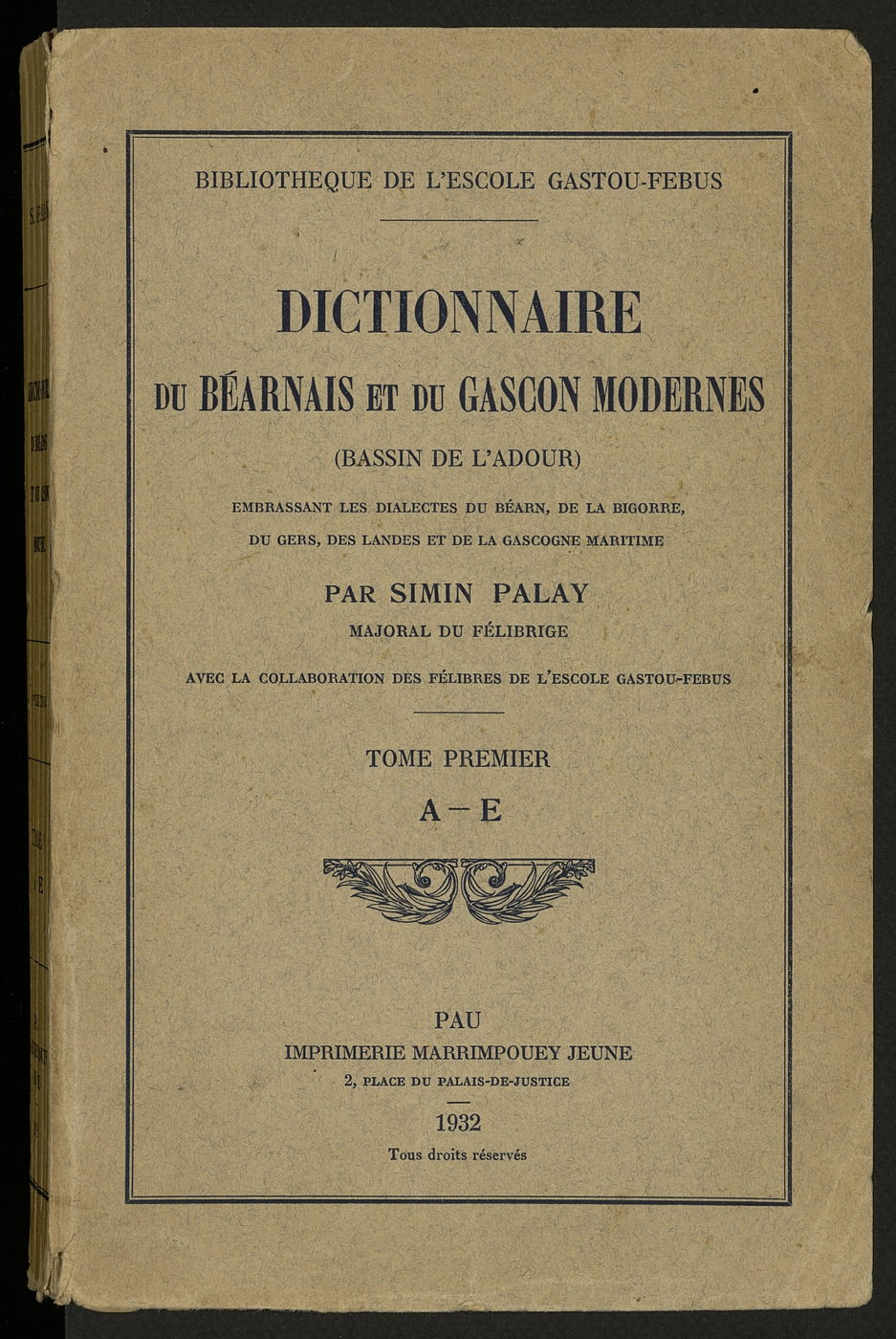 Première édition du dictionnaire de Simin Palay consacré au dialecte gascon, publié à Pau en 1932, sous les auspices de l'« Escole Gastou Febus » en deux volumes, sur le modèle du Trésor du Félibrige de Frédéric Mistral. L'ouvrage connaîtra une seconde édition publiée en 1961 aux éditions du CNRS.